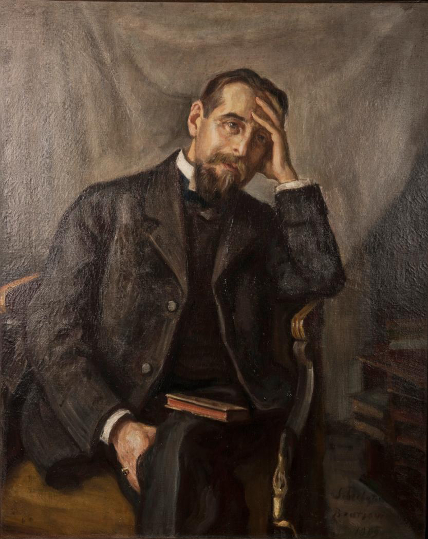 Portrait du baron Joseph de Baye (1853-1931)